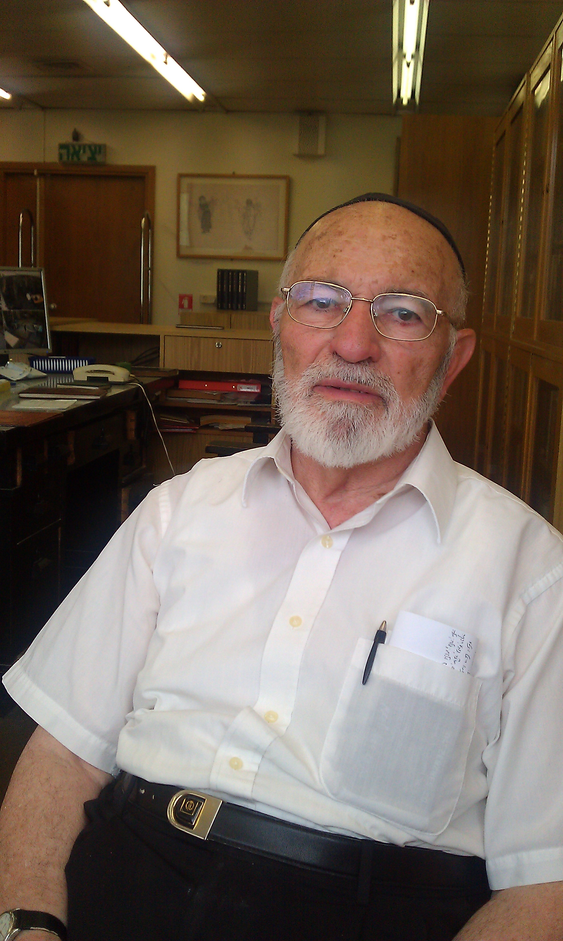 הרב מאיר וונדר